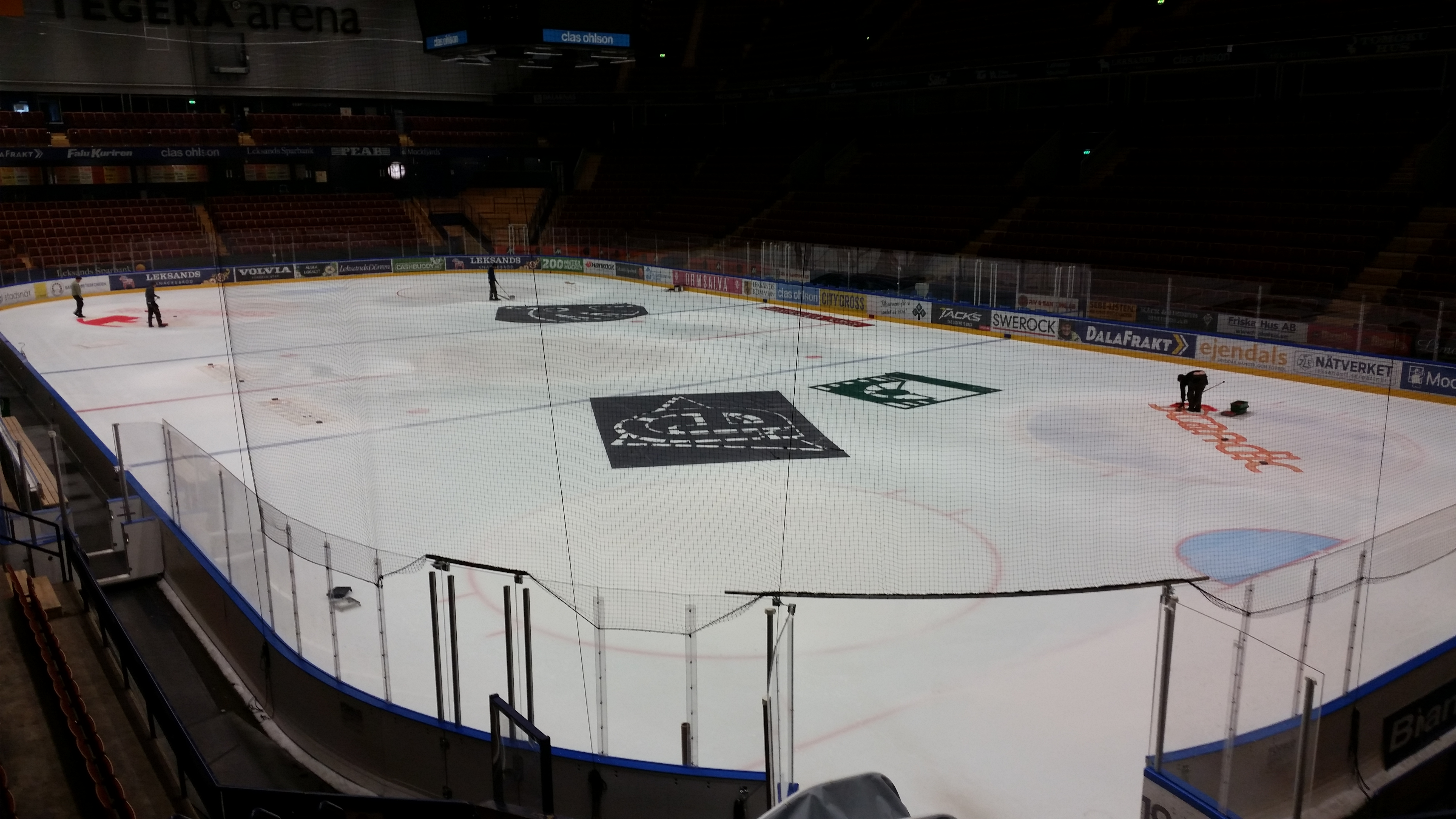 Byte av reklam på isen inför att Tre kronor ska spela landskamp mot Ryssland i Tegera Arena.